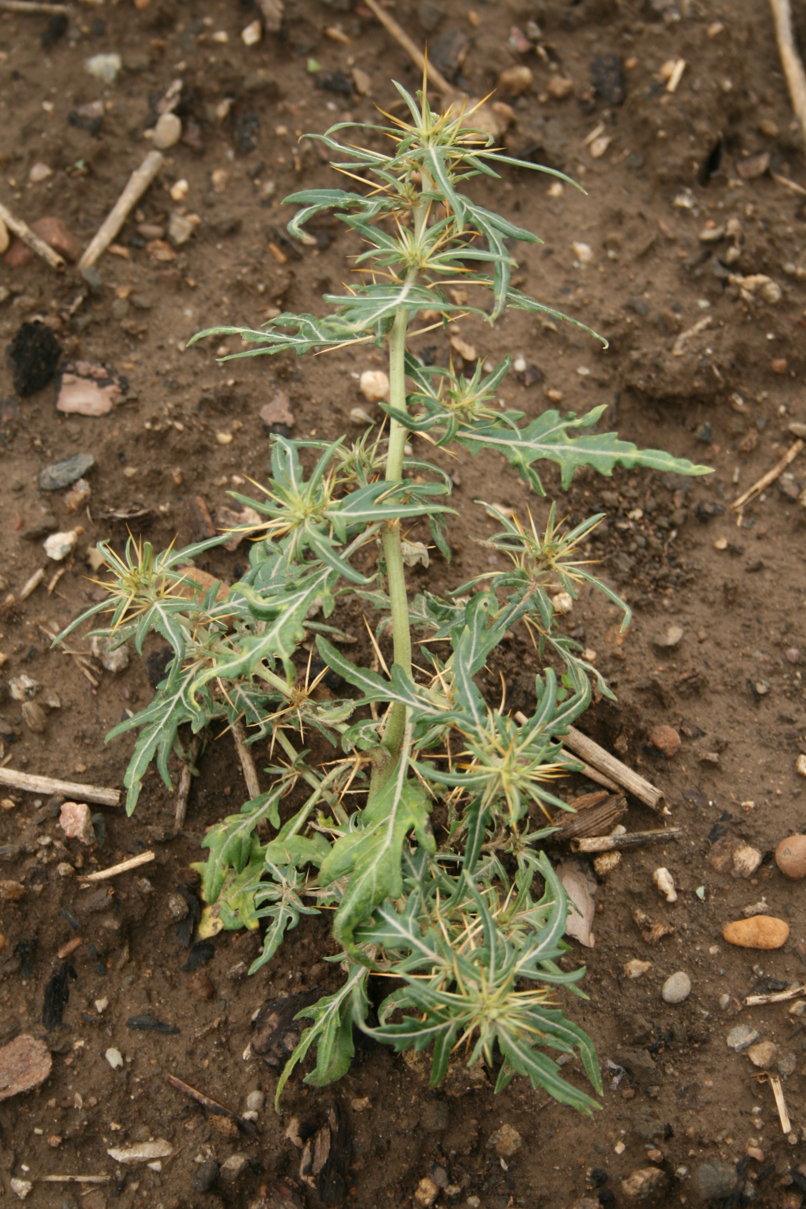 Xanthium spinosum